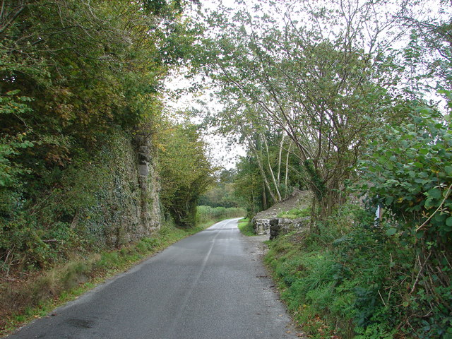 Ystwyth Trail near Trawsoged, Ceredigion.